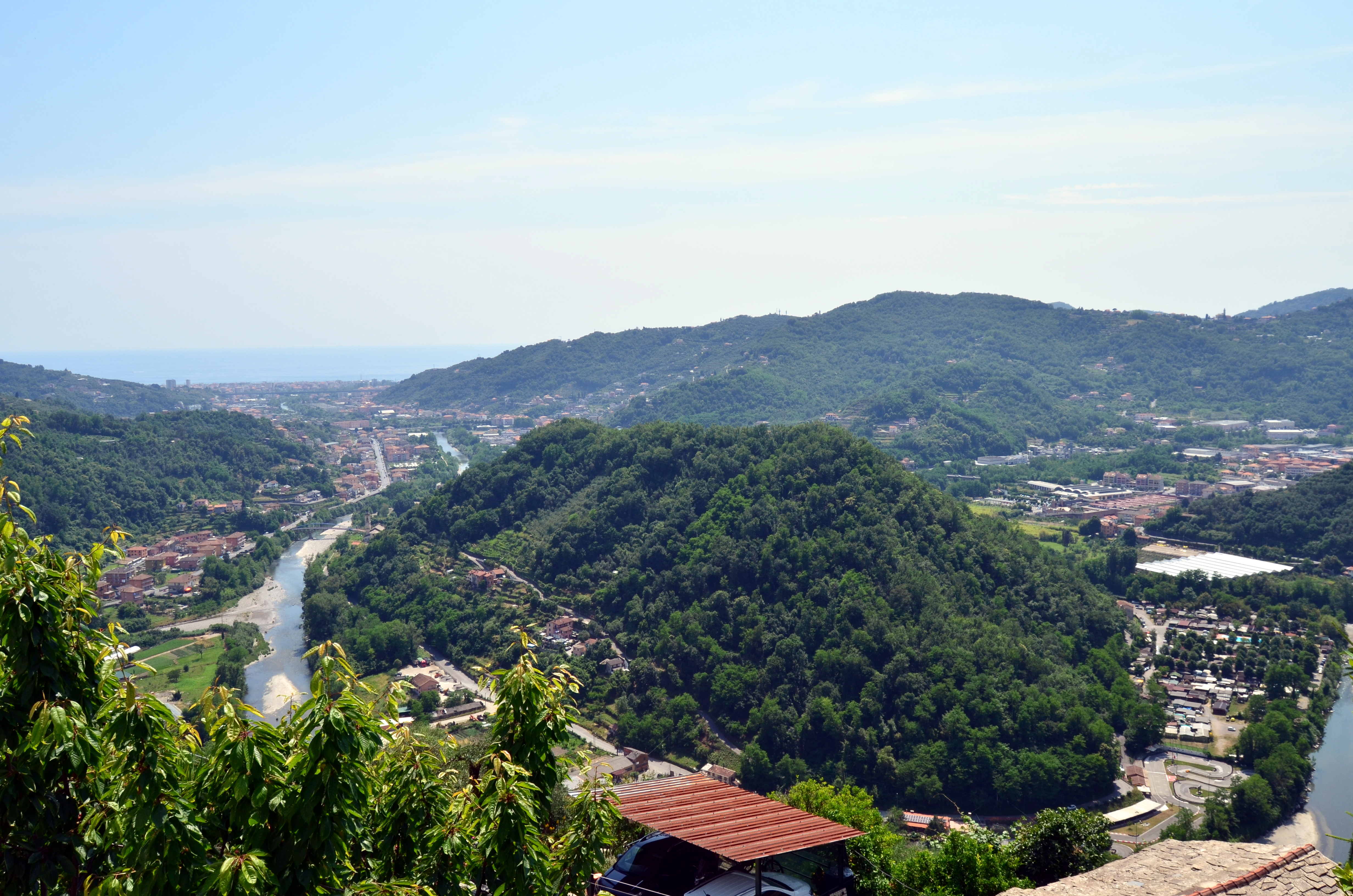 Poggio dove era ubicato il medievale castello di Rivarola, Carasco, Liguria, Italia